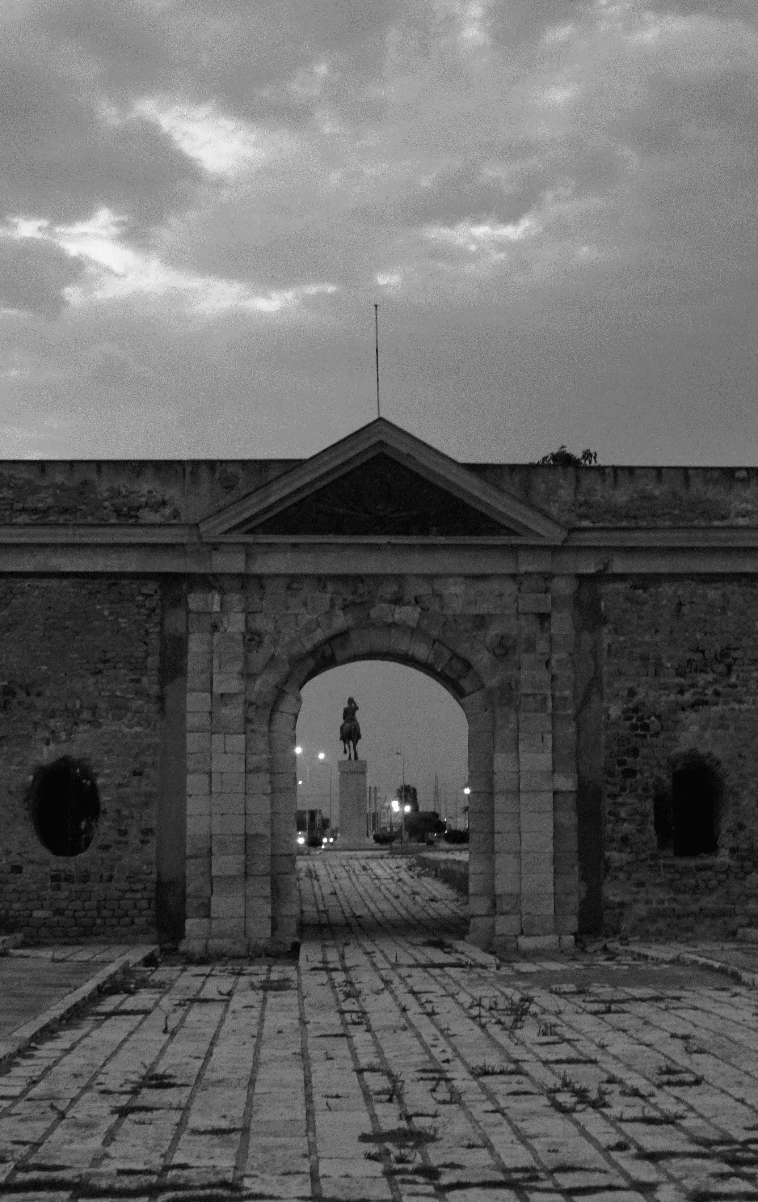 Façade de l'ancien arsenal beylical